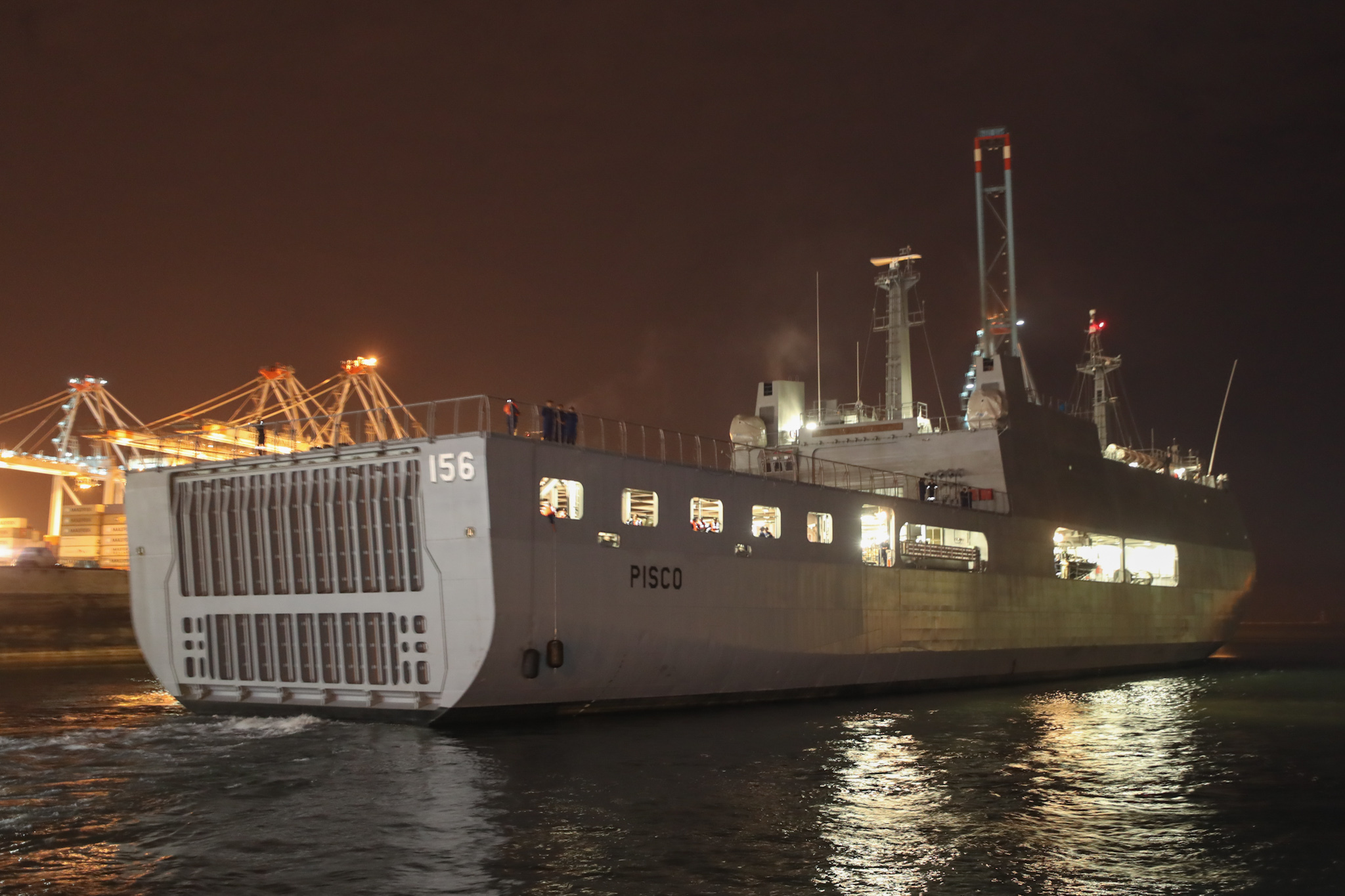 BAP Pisco zarpando hacia Paita con ayuda logística para atender zonas afectadas por lluvias y desbordes